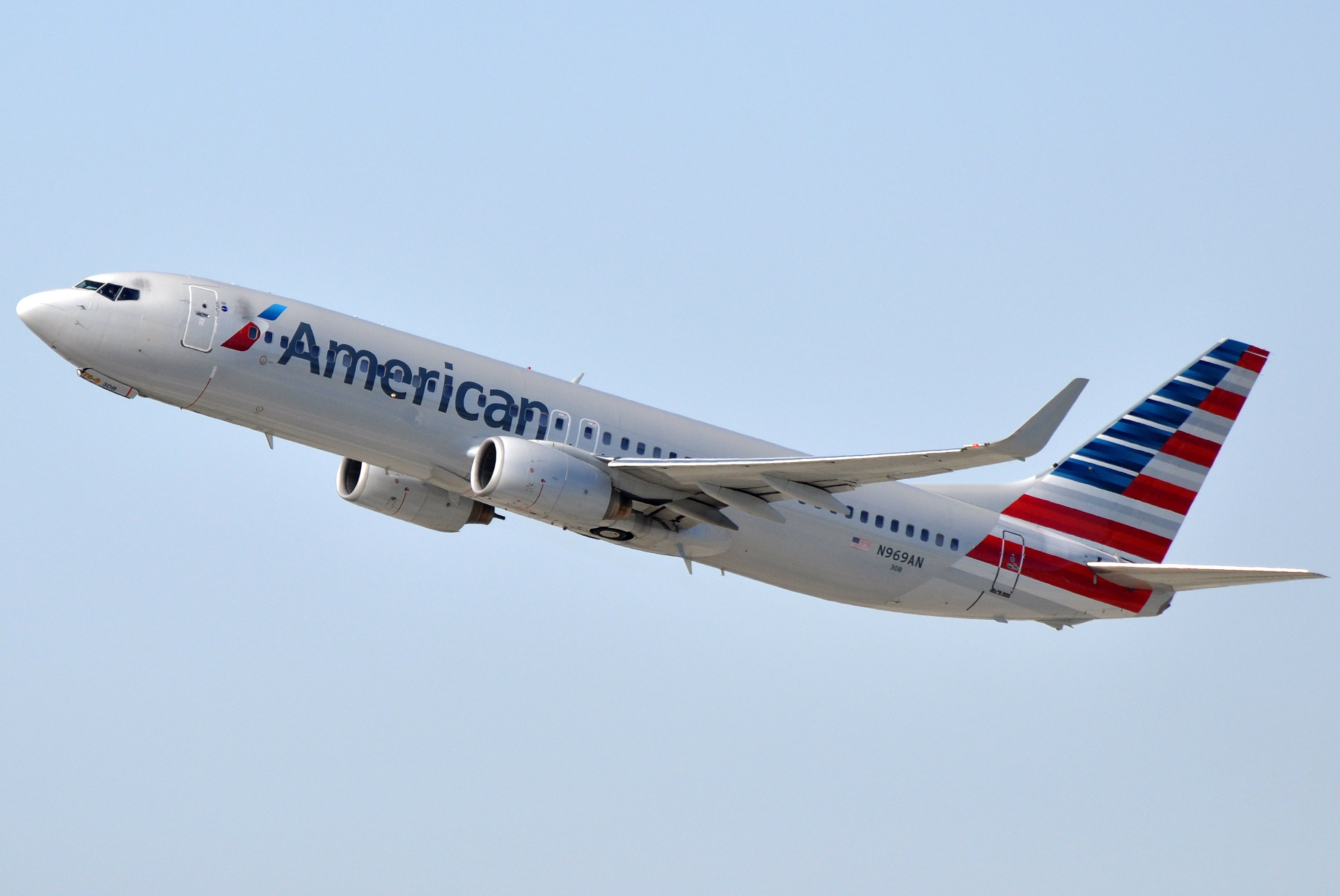 MSN 29546 LN 910 B737-823 AMERICAN AIRLINES LAX AIRPORT